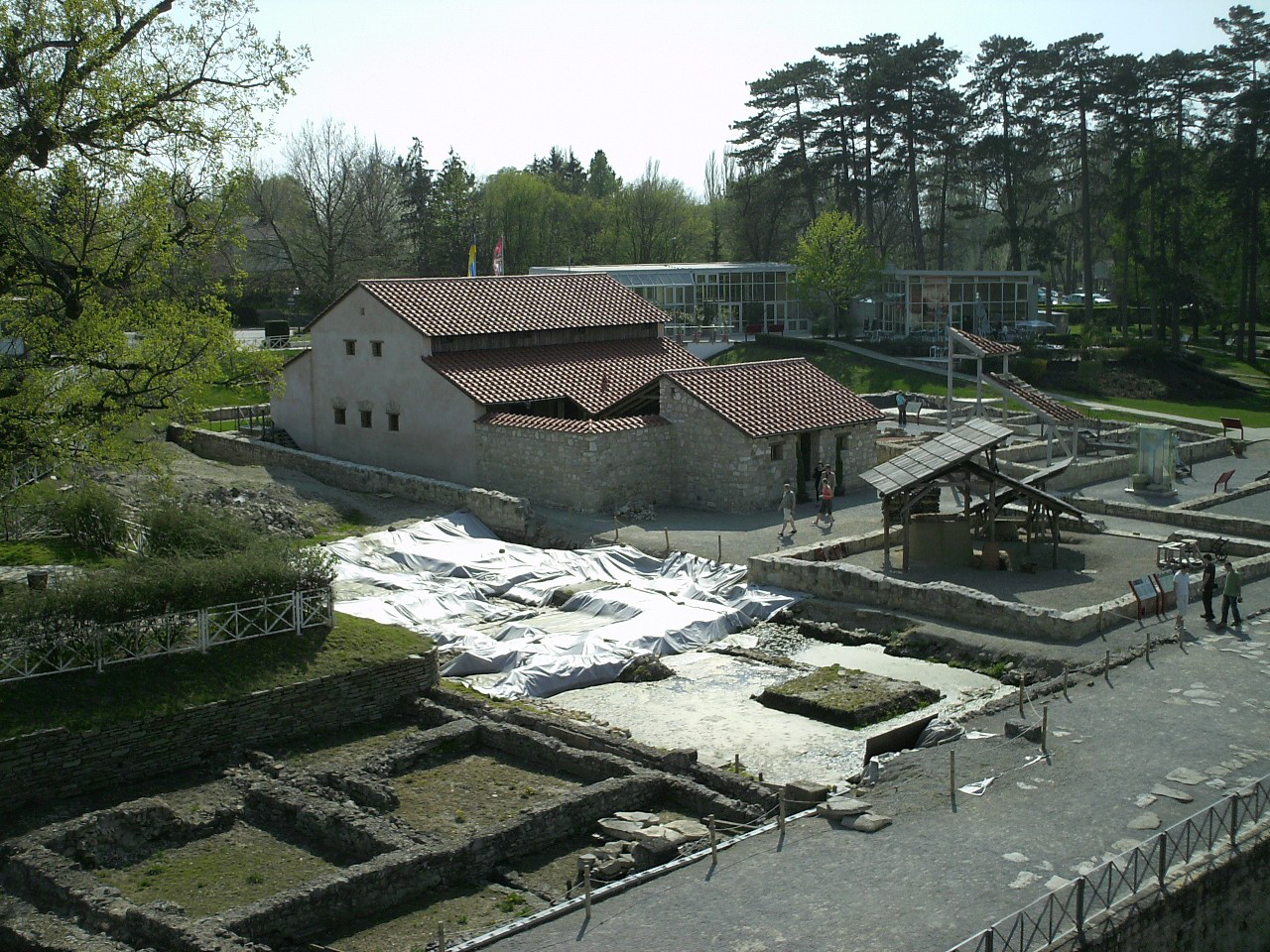 Rekonstruktion eines Wohn- und Wirtschaftshauses im Archäologiepark Carnuntum-Österreich